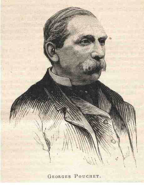 Portrait de Georges Pouchet illustrant l'article nécrologique publié dans la revue La Science Illustrée n°336 du 5 mai 1894